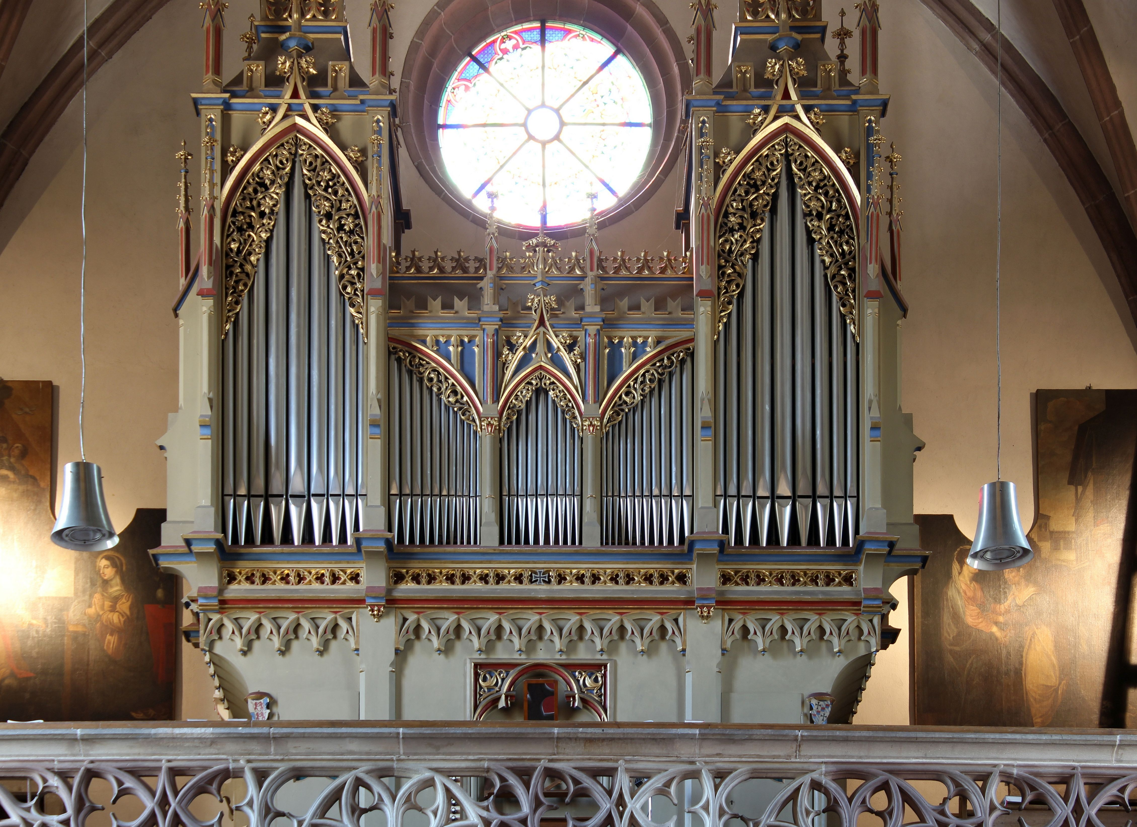 Aigner-Orgel in der alten Pfarrkirche Mariä Himmelfahrt in Lana